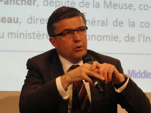 Colloque RSE